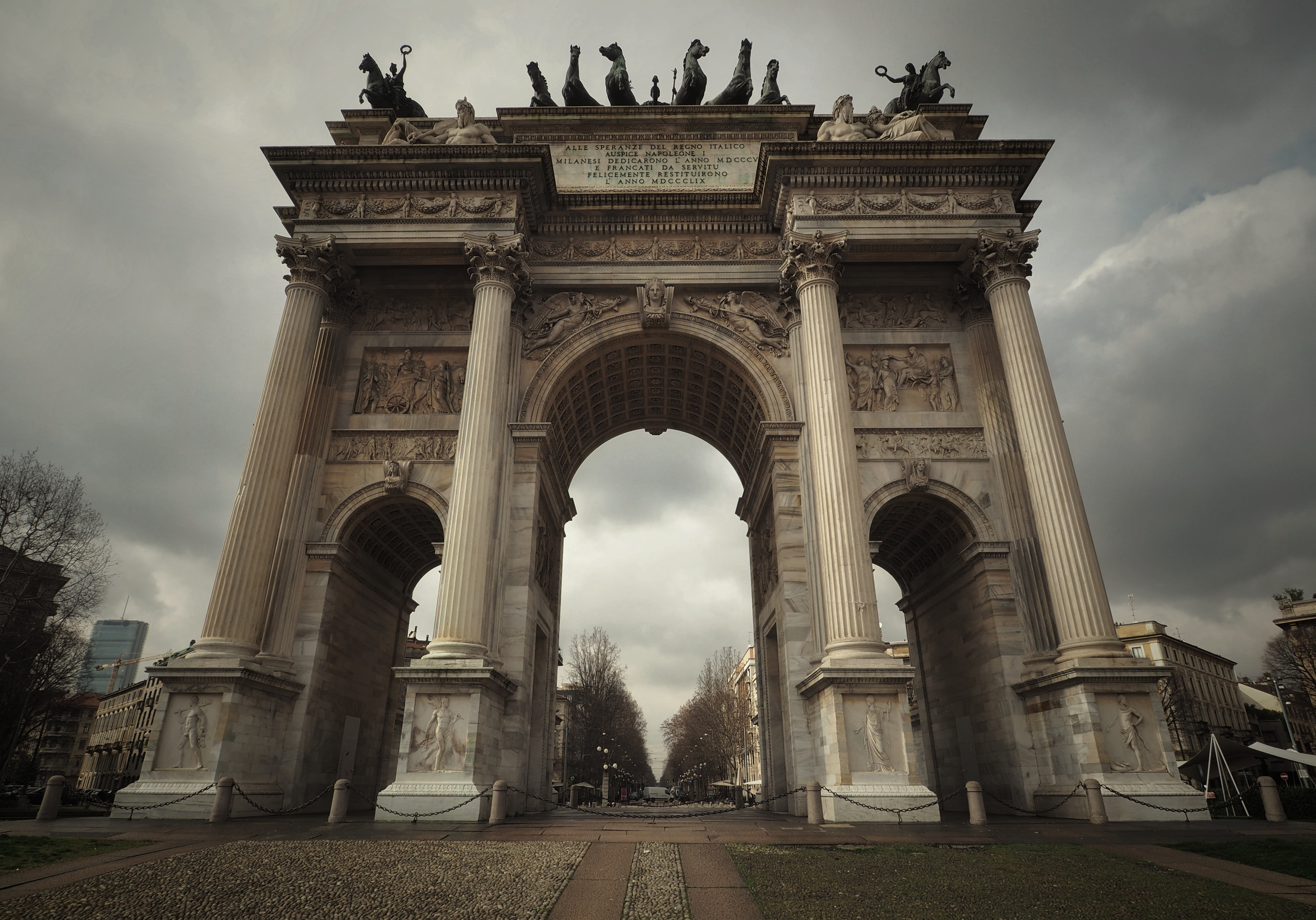 Milano, Italia